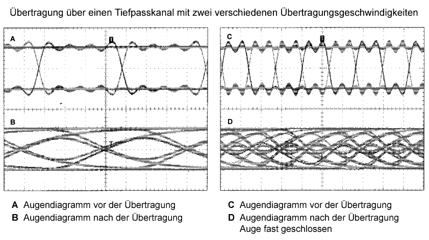 Augendiagramme bei einer Übertragung über einen Tiefpasskanal mit zwei unterschiedlichen Übertragungsgeschwindigkeiten.